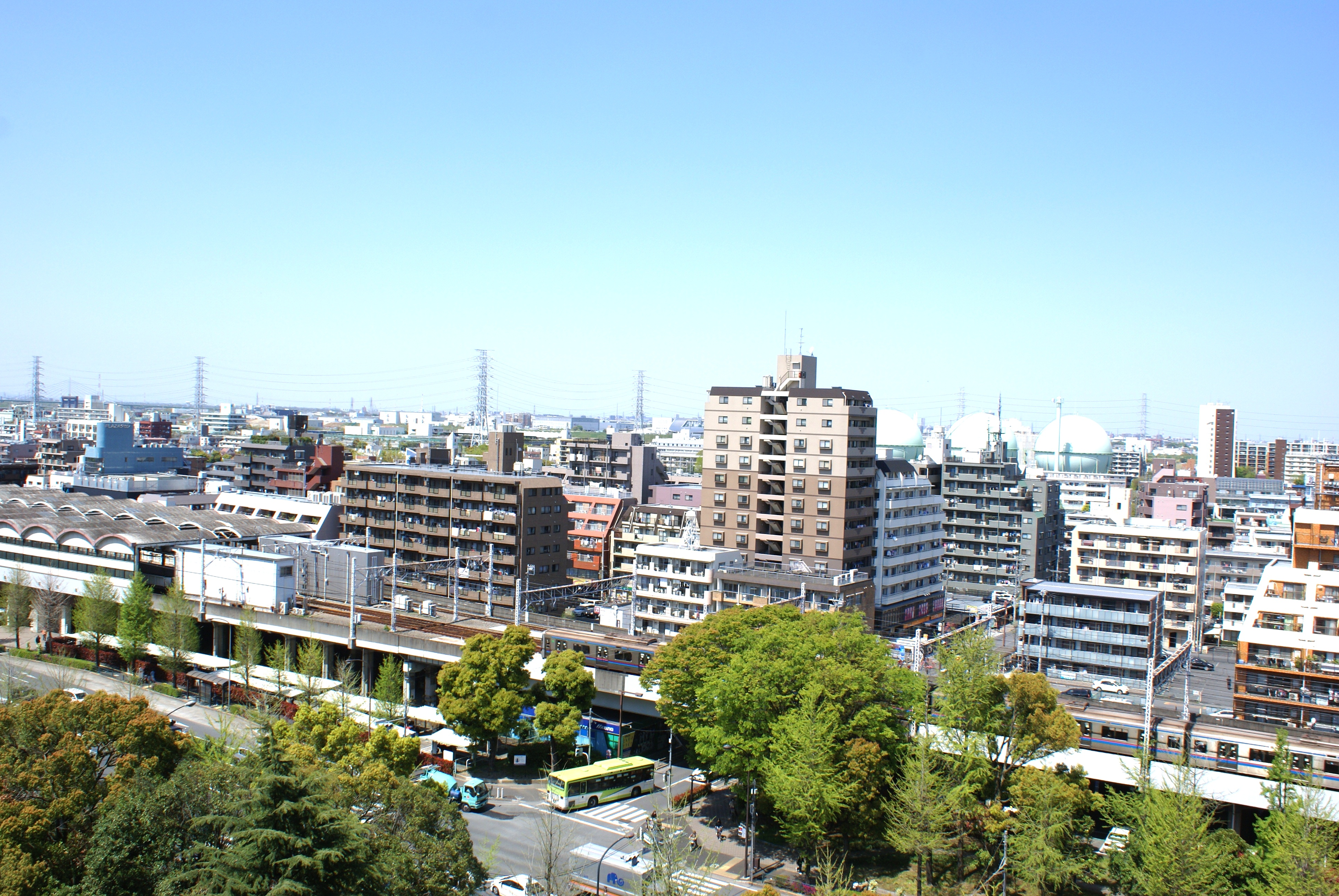 高島平駅に到着する地下鉄三田線列車